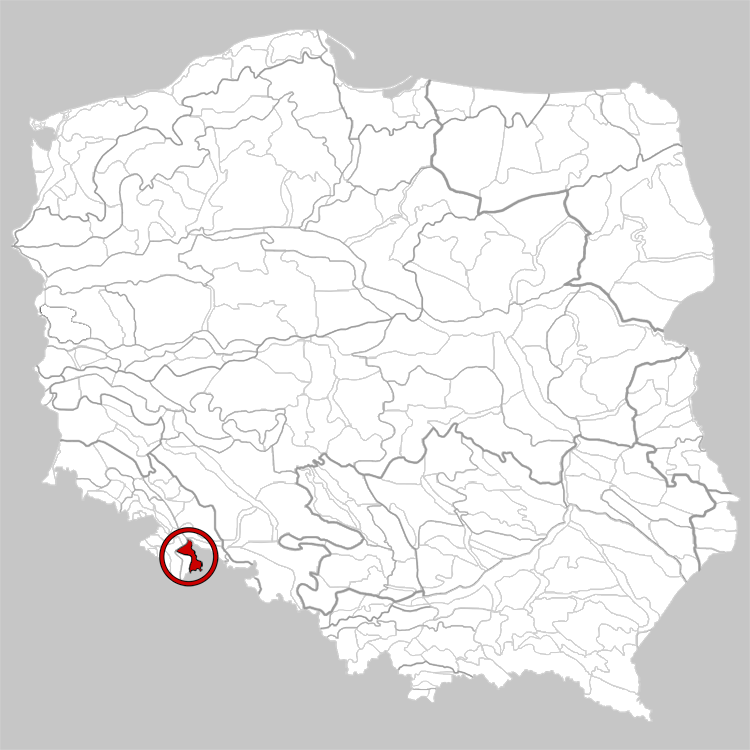 Physico-geographical regionalization of Poland Mezoregion 332.61 Golden Mountains Regionalizacja fizycznogeograficzna Polski Mezoregion 332.61 Góry Złote